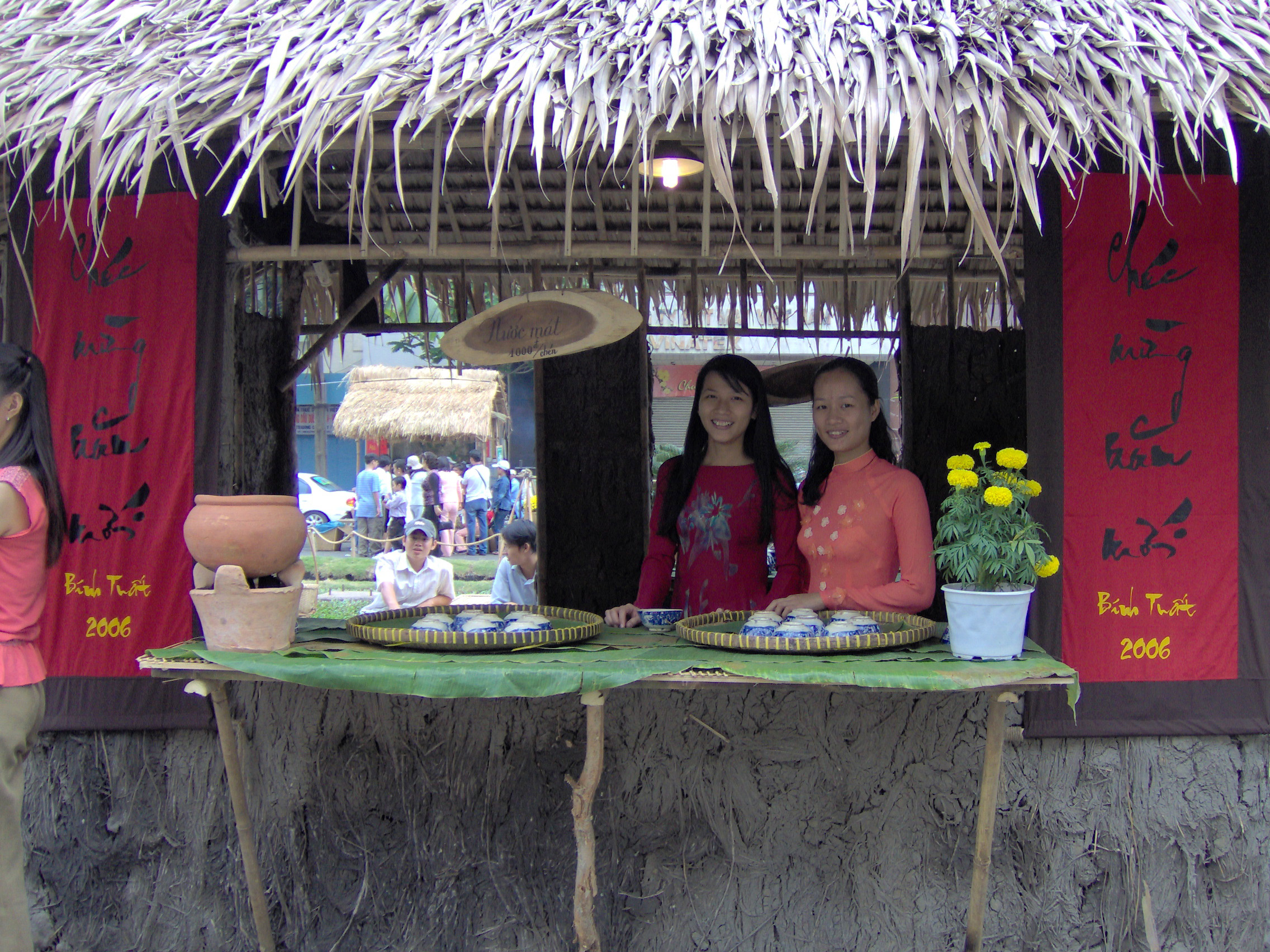 Một quán nước dân dã xuất hiện ở đường hoa Nguyễn Huệ.